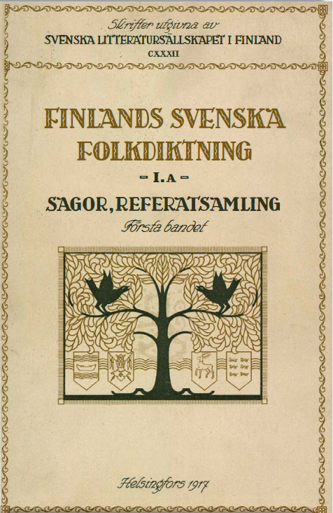 Book cover. Finlands svenska folkdiktning.